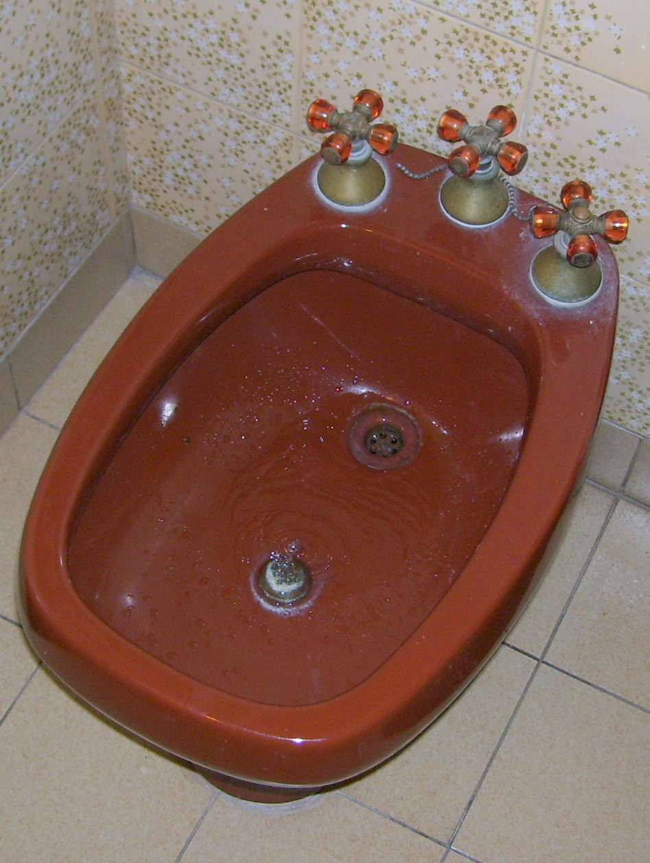 My Bidet